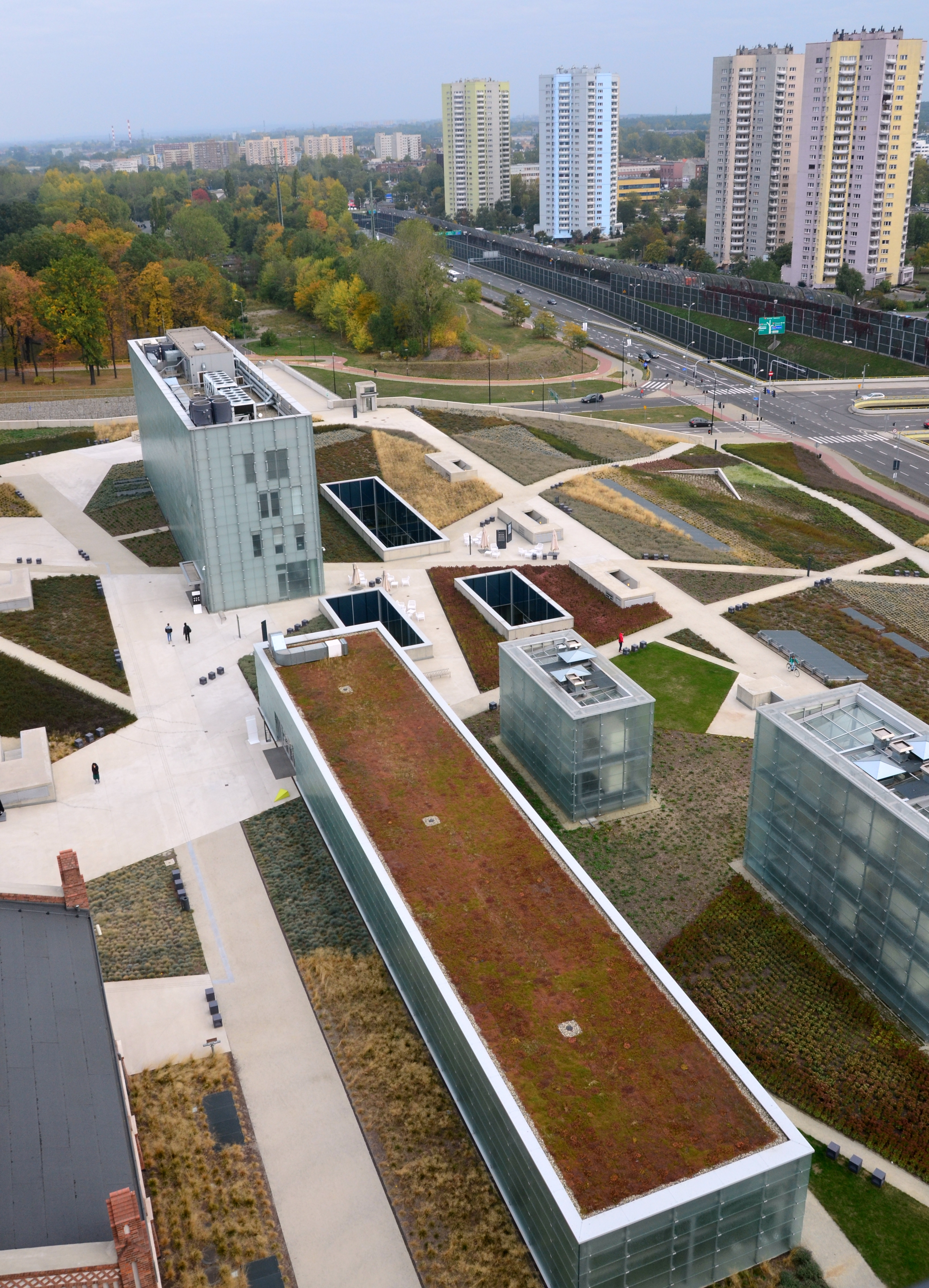 Schlesisches Museum (Kattowitz)